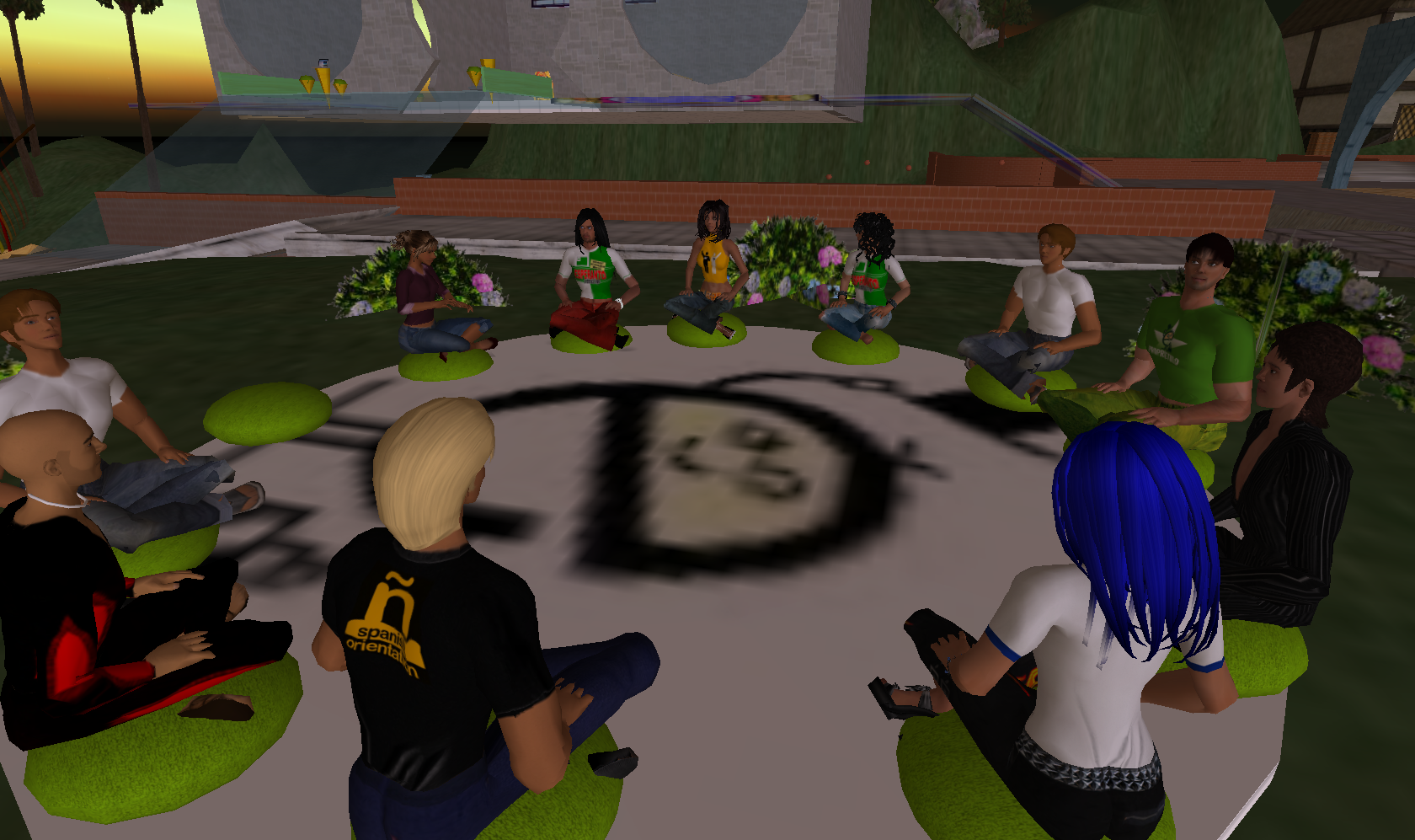 DV-foto de Esperanto-rondo en Esperanto-Lando